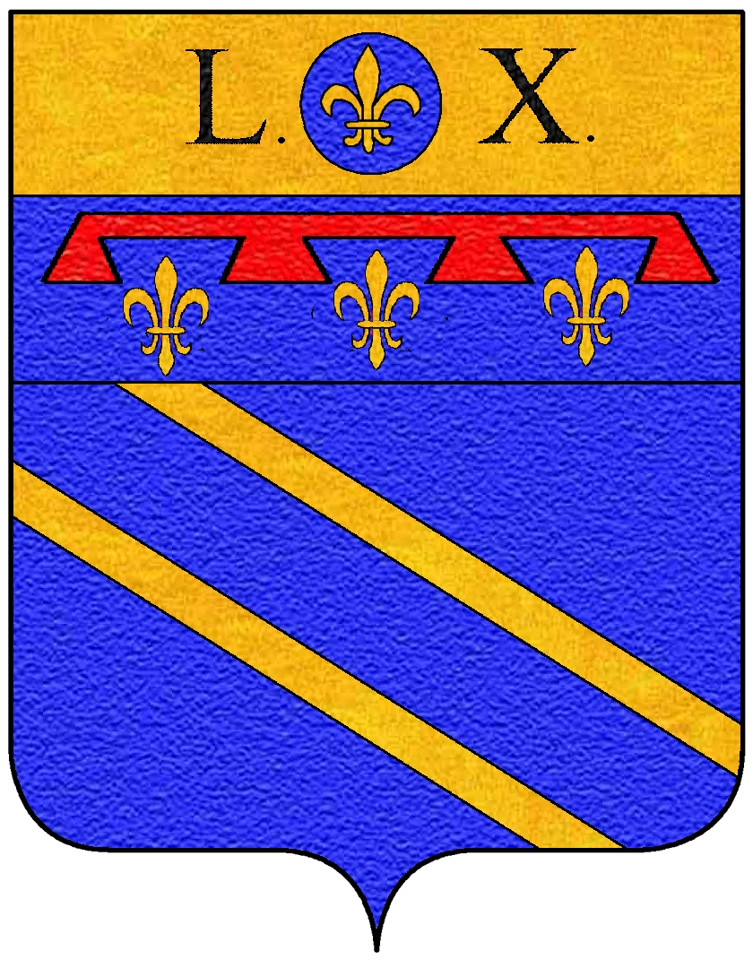 Stemma della famiglia Buonarroti